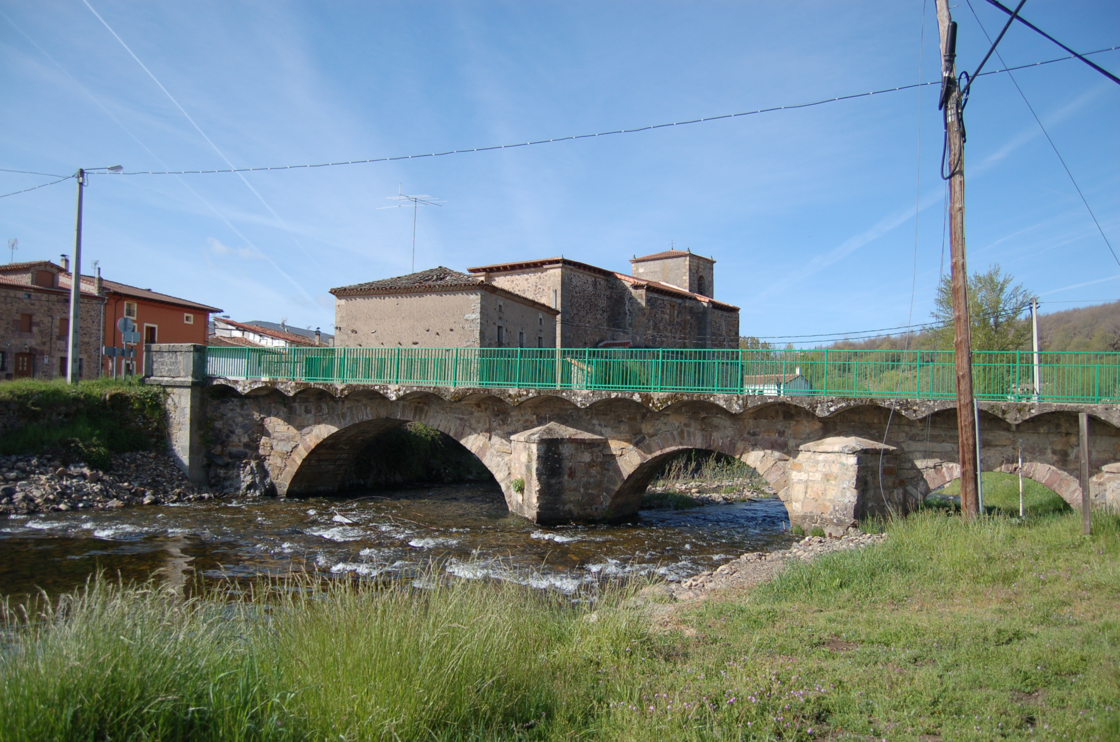 Puente sobre el río Pedroso en Barbadillo del Pez